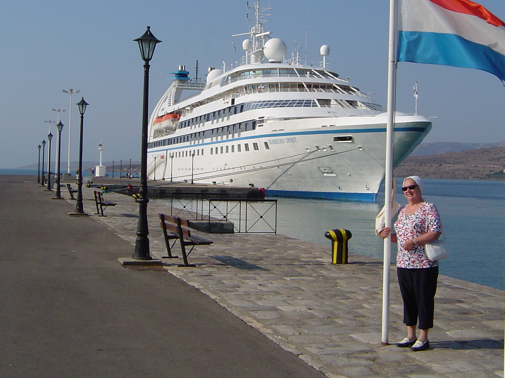 Am Hafe vu Katakolon ginn d'Touriste mat dem Lëtzebuerger Fëndel begréisst.